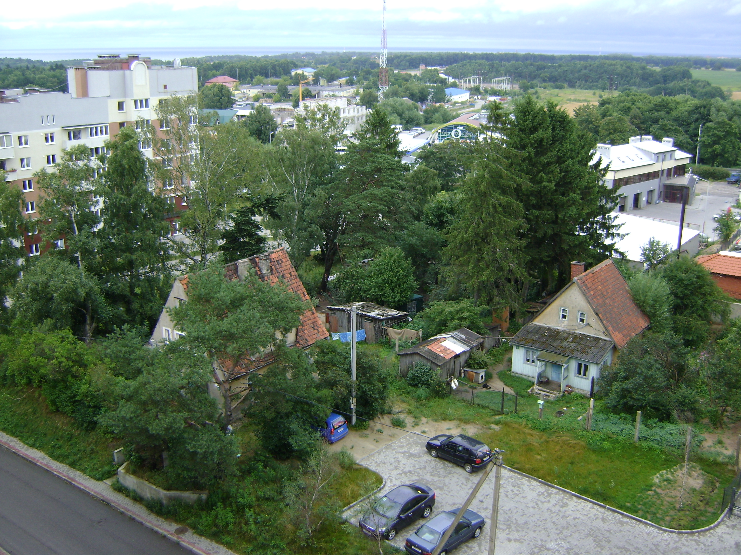 Эти неухоженные, но симпатичные и ещё крепкие домики на ул. Фруктовой, вместе со всеми деревьями вокруг, в 2014 снесут, и на их месте в 2015 построят трёхподъездный 9-этажный дом с автостоянкой, отчего появится ещё и большой район сплошной застройки.